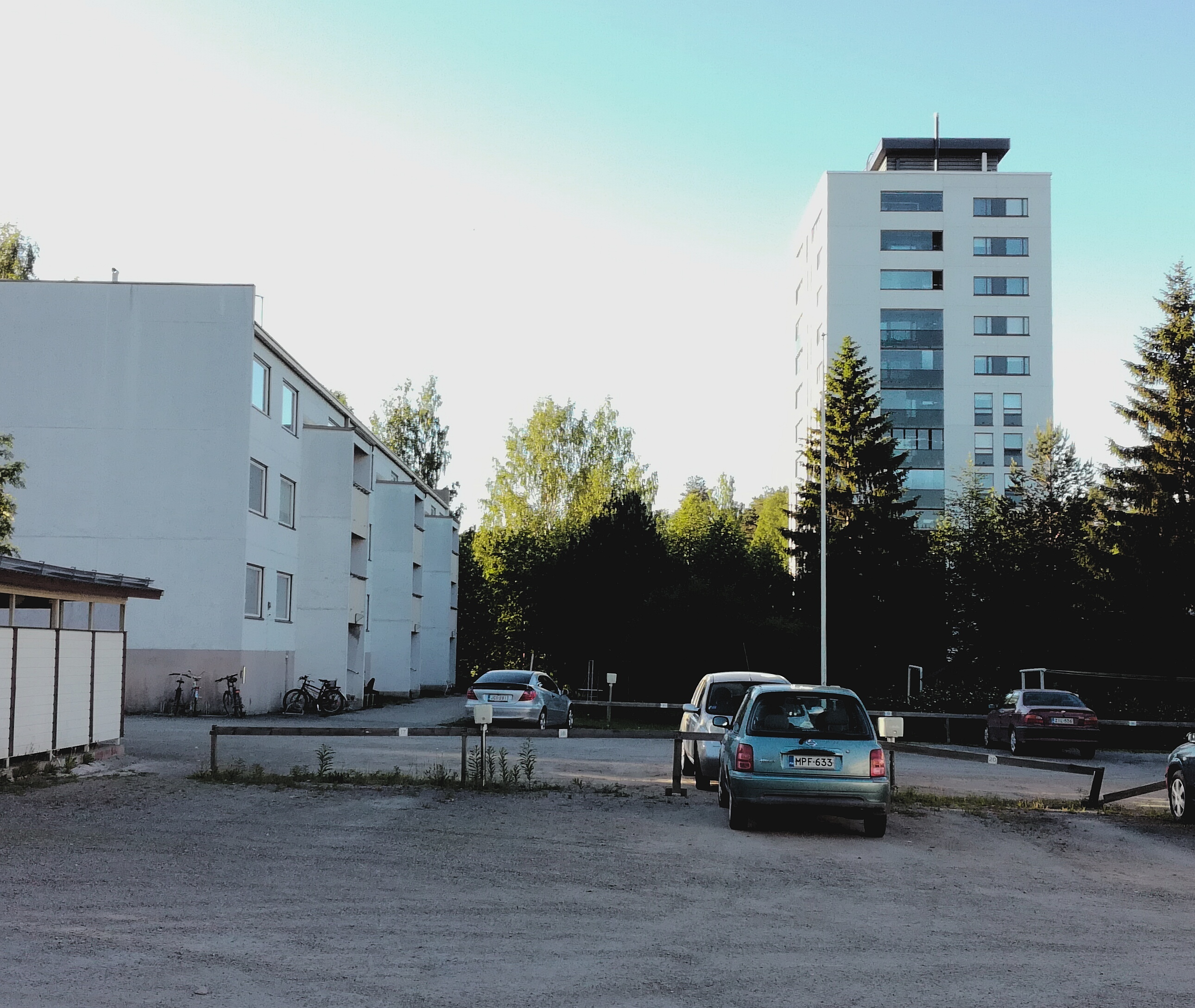 Vasemmalla vuonna 1968 valmistunut kerrostalo (Haavikatu 1) ja taustalla vuonna 2012 valmistunut tornitalo Majakka Jyväskylän Lohikoskella.